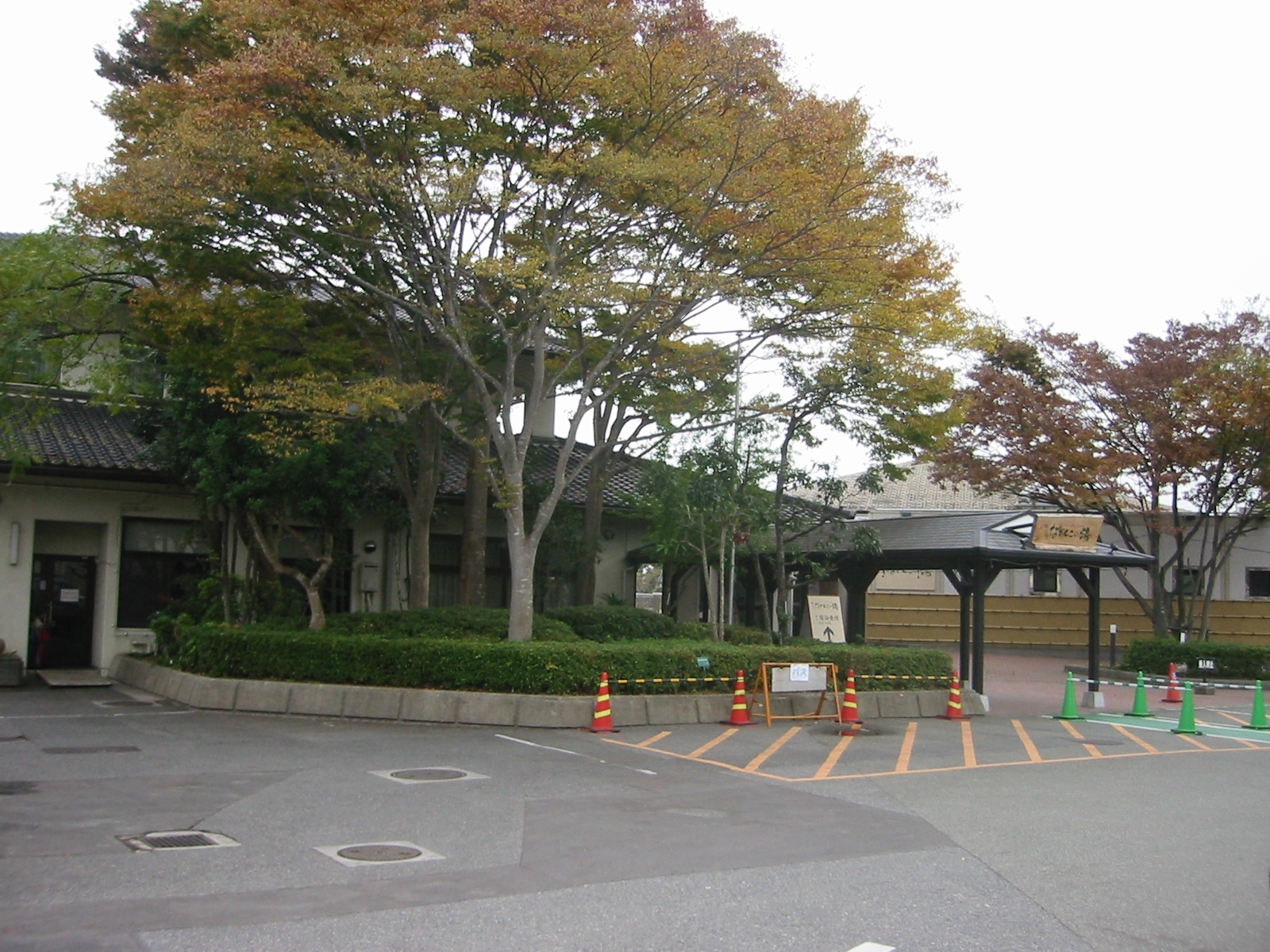 神戸市太山寺。